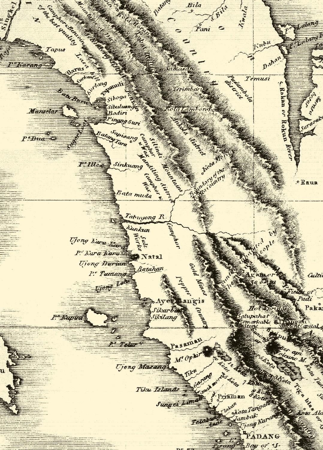 Karte Sumatras von Marsden